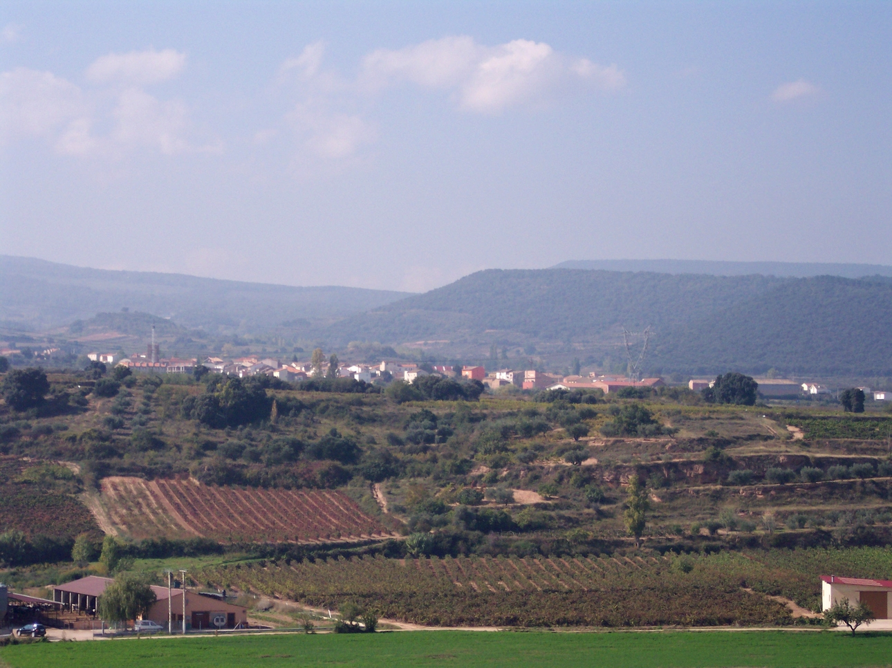 Imagen de Medrano hecha desde Entrena.